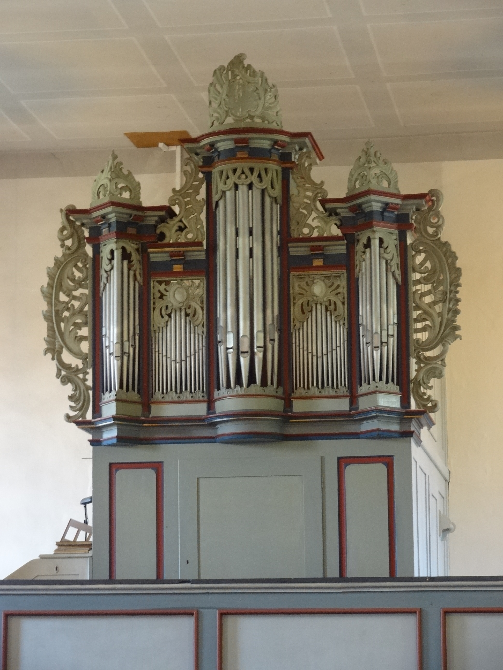 Evangelische Pfarrkirche (Münster, Butzbach)